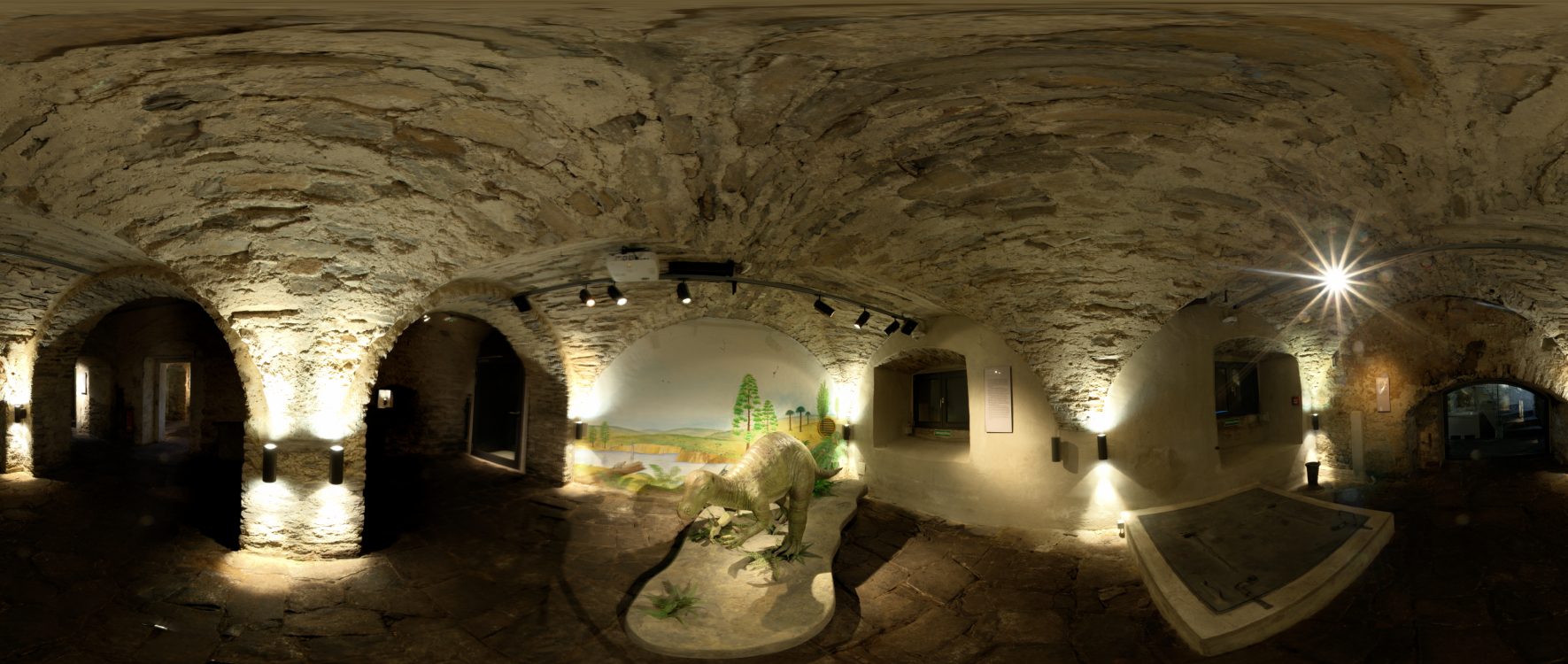 Ausstellungen im Museum Haus Hövener Museum Haus Hövener Native nameMuseum Haus Hövener LocationBrilon , GermanyCoordinates51° 23′ 44.16″ N, 8° 34′ 05.52″ E Established1983 Web page Authority control : Q1667289 VIAF: 201846718 GND: 7762529-8 institution QS:P195,Q1667289